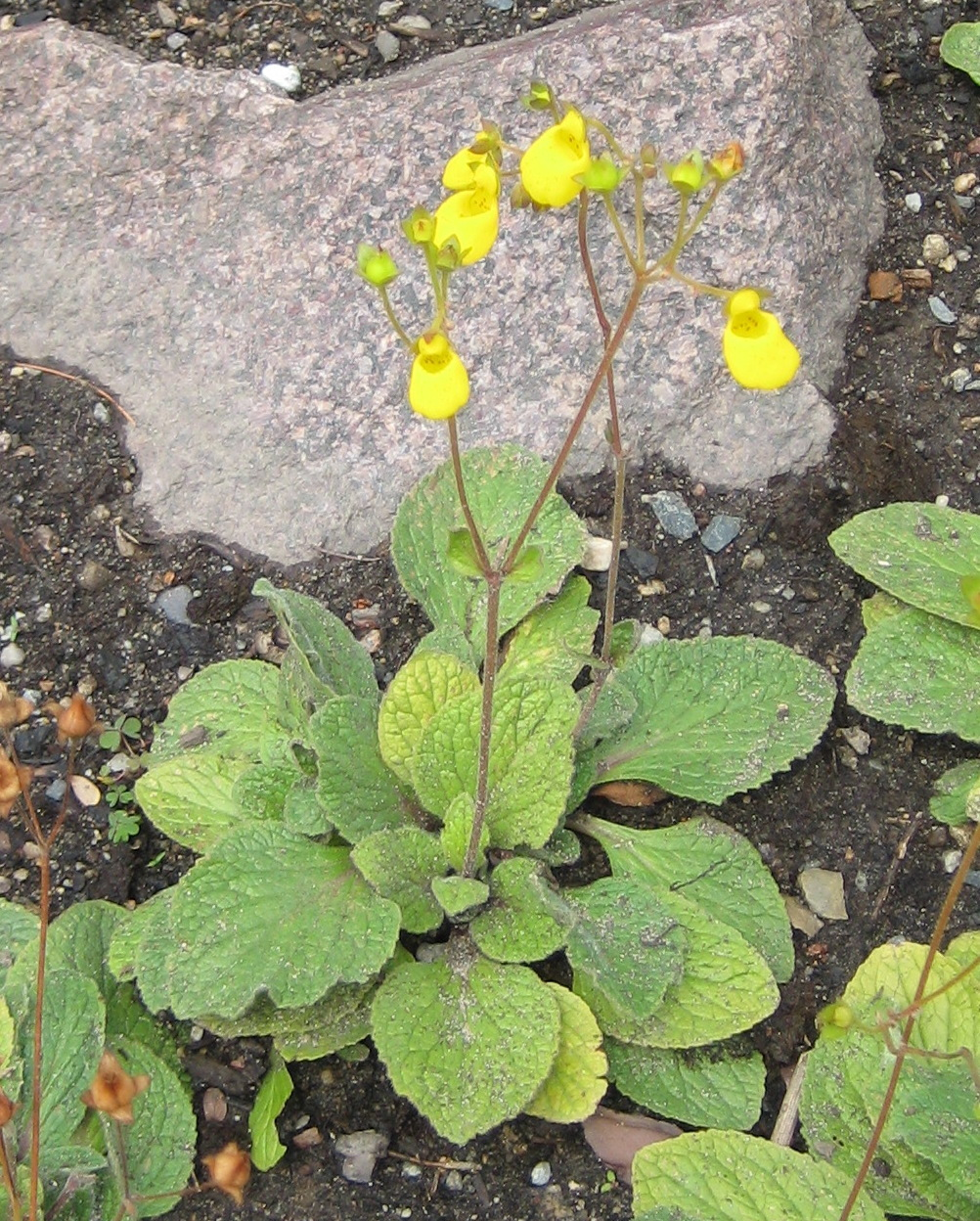 Calceolaria andina im Botanischen Garten Dresden